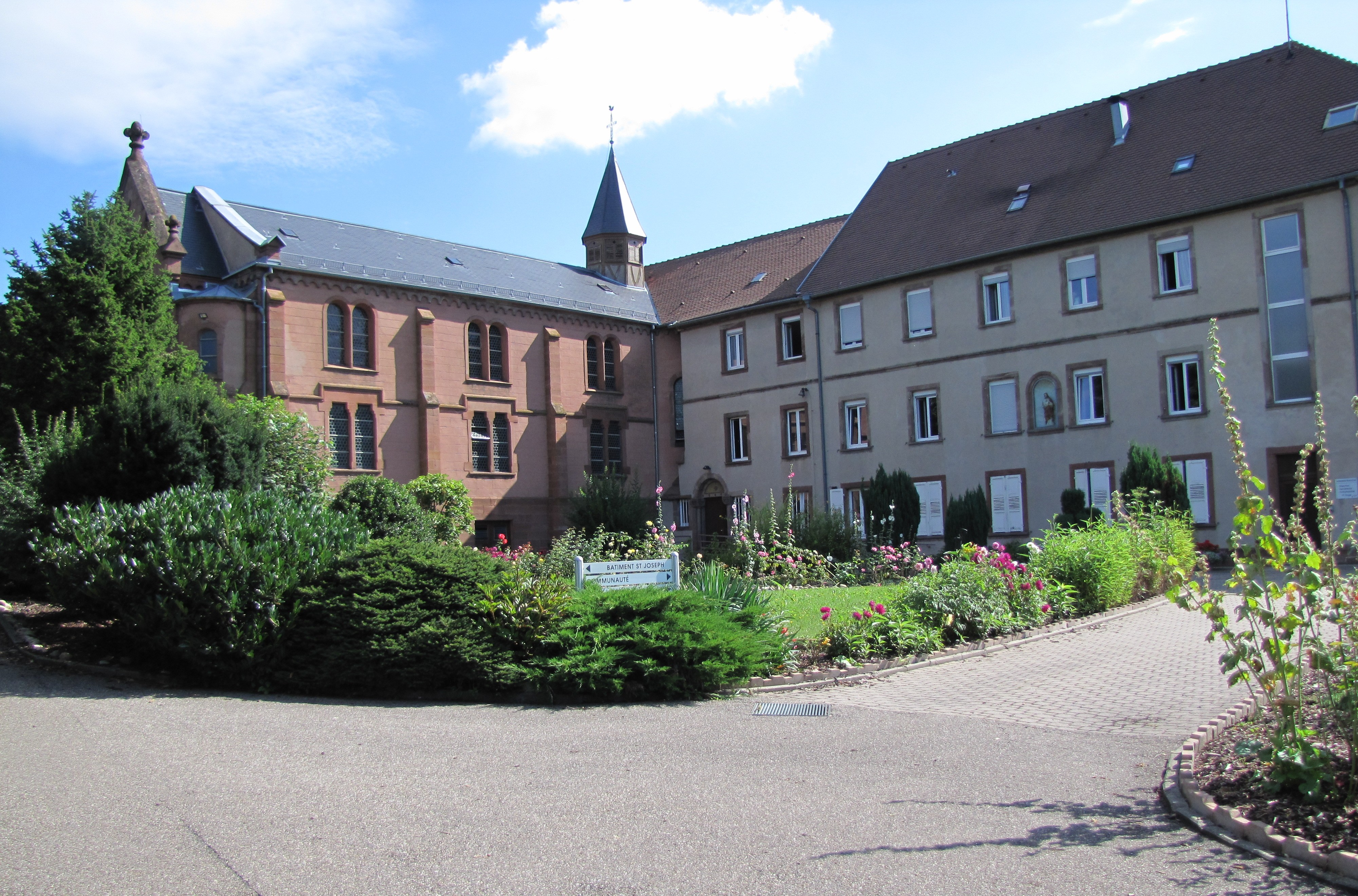 Alsace, Bas-Rhin, Dauendorf, Couvent de sœurs du Sacré-Cœur-de-Jésus et de Marie: chapelle (1885-1897).